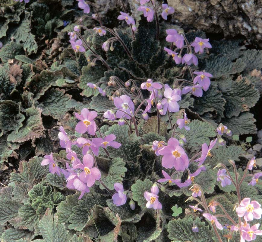 Ramonda myconi dans les Pyrénées